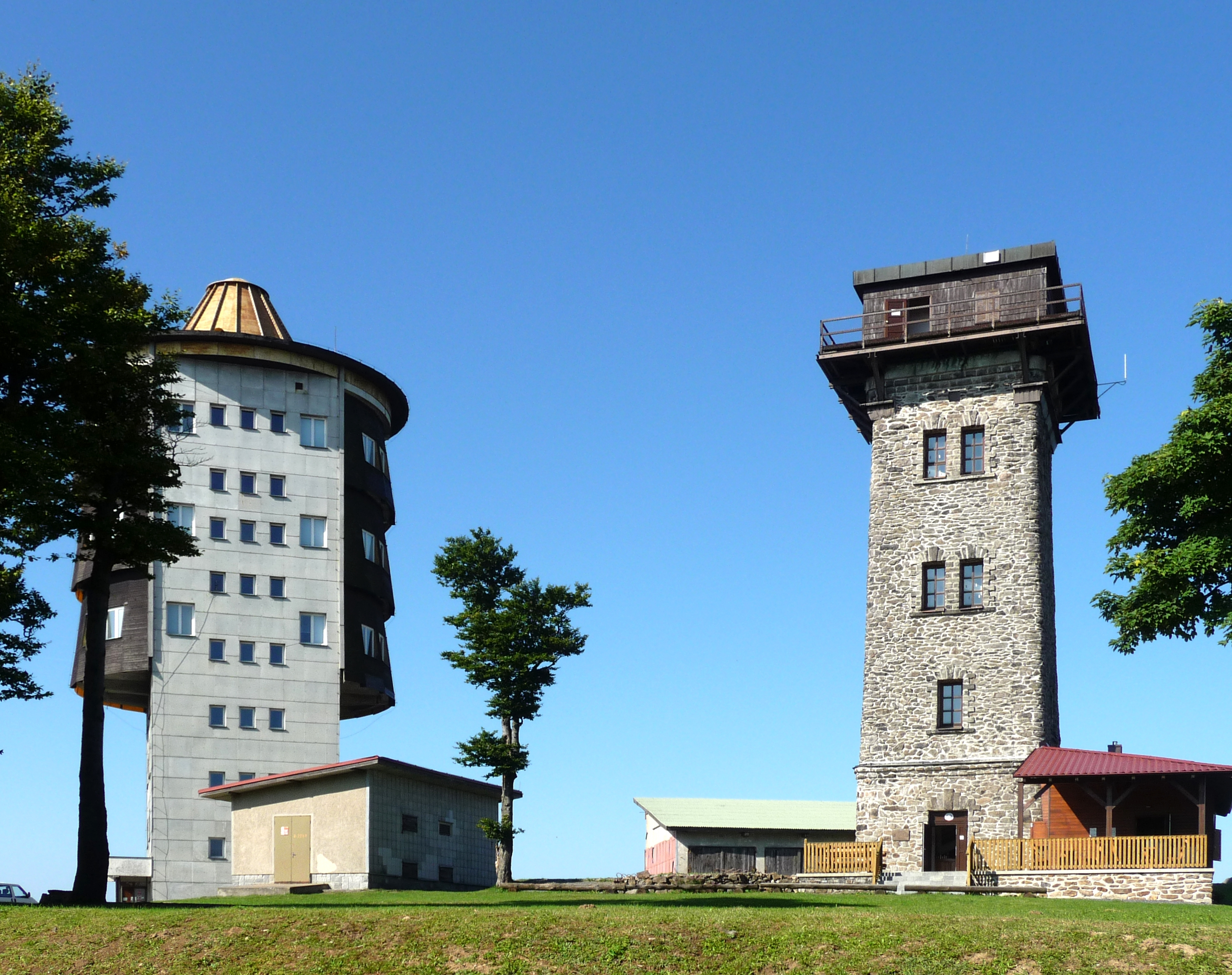 Türme auf dem Gipfel des Cerchov